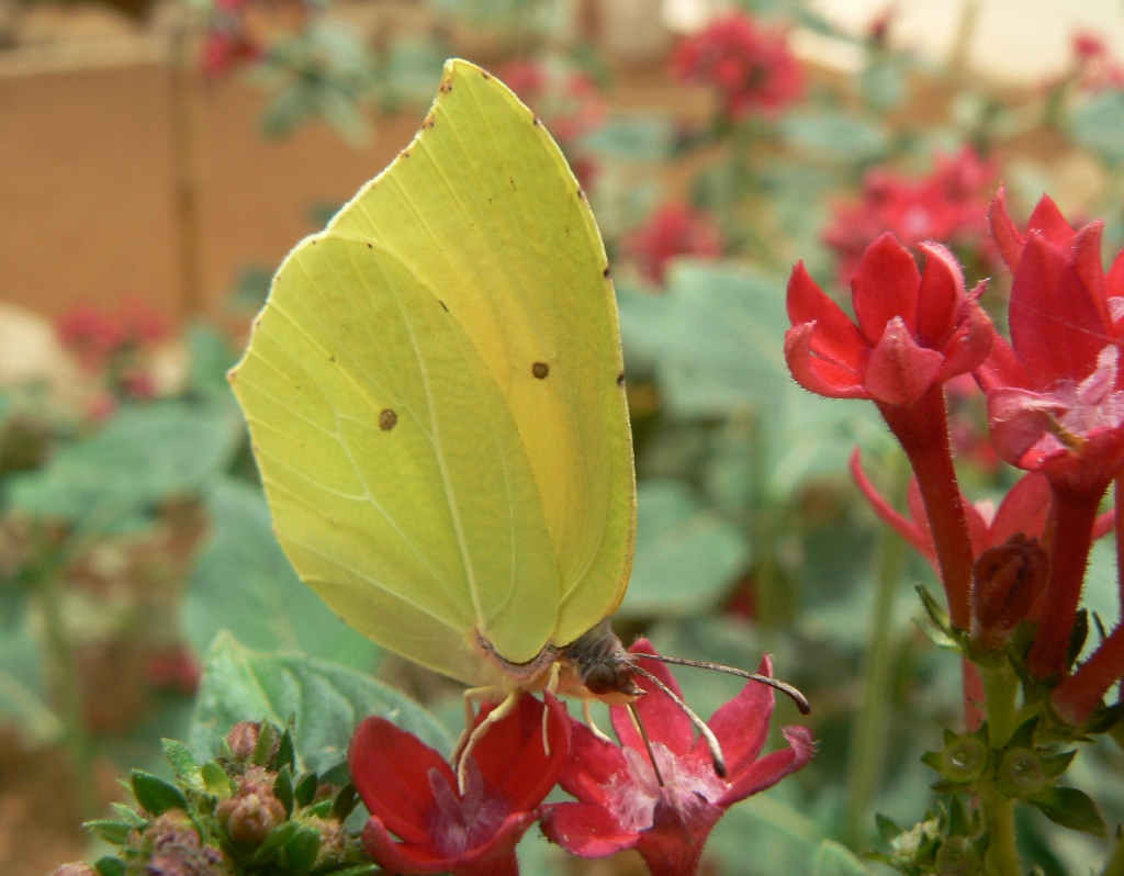 לימונית האשחר בגבעת ברנר